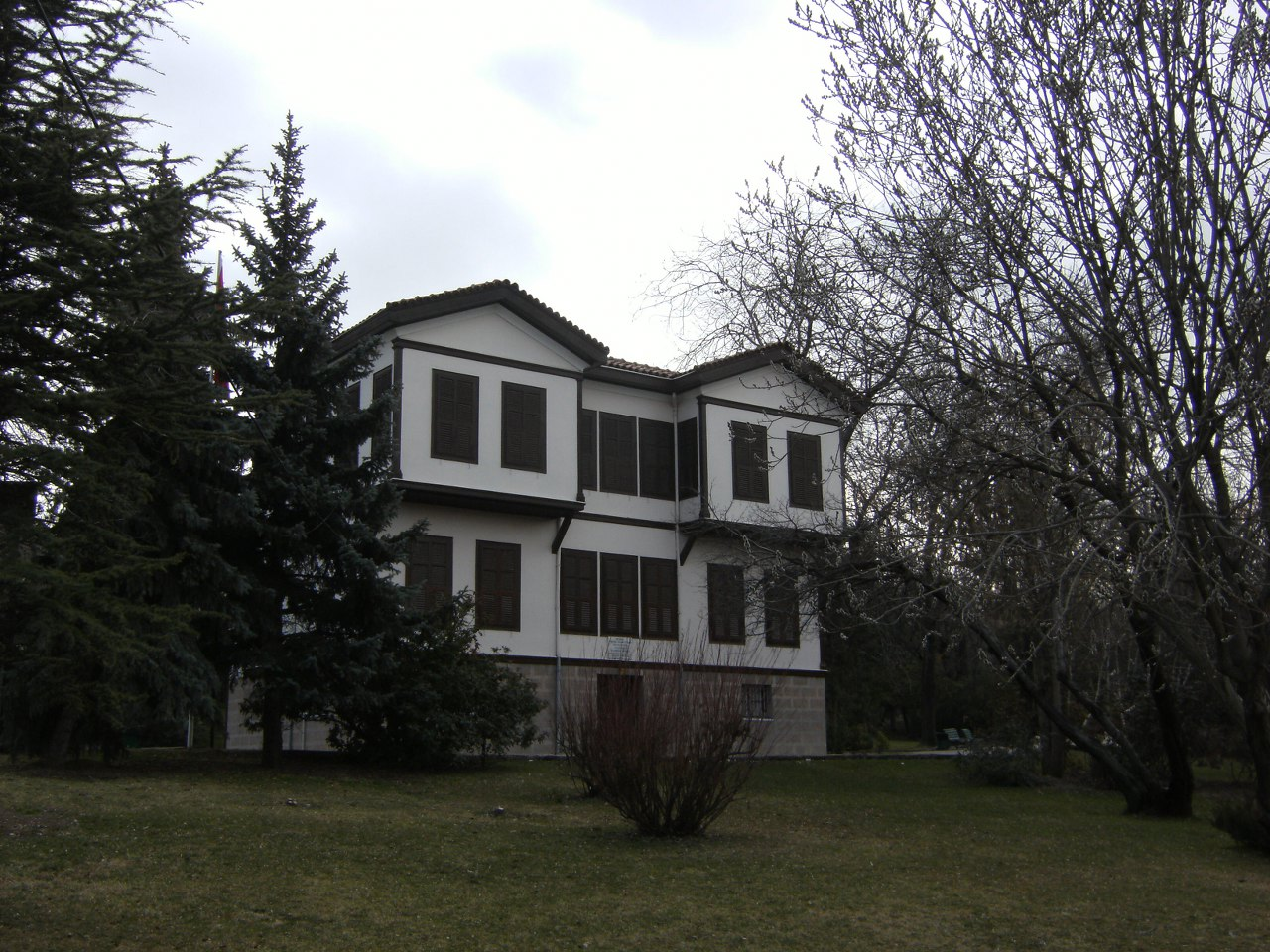 AOÇ Atatürk evi müzesi